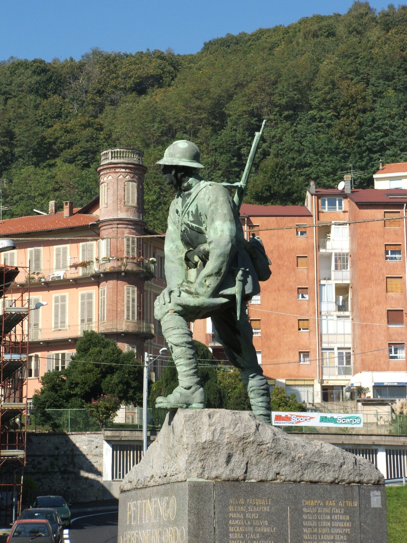 Pettinengo (provincia di Biella, Piemonte, Italia) Monumento ai caduti della prima guerra mondiale / 2